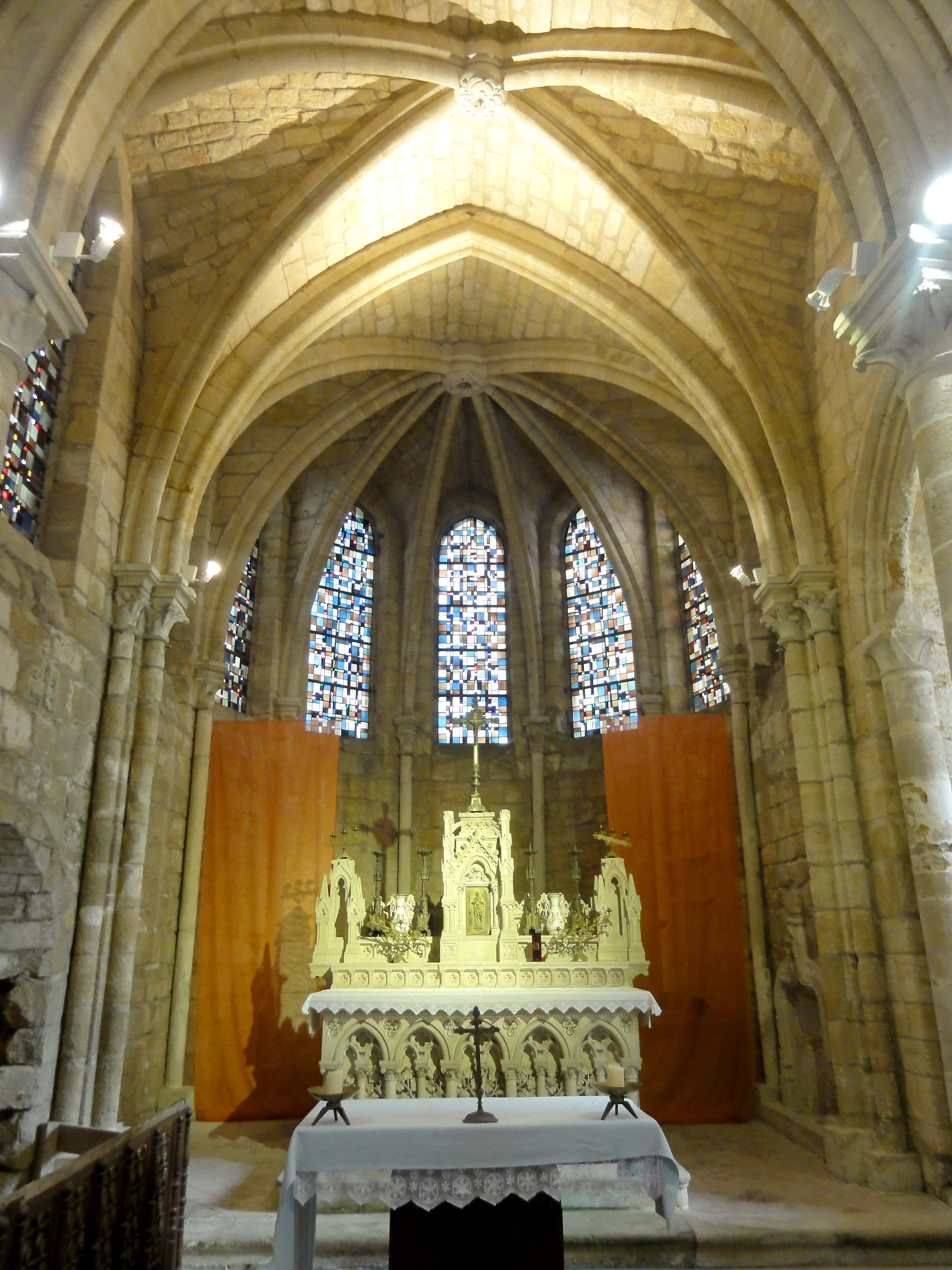 Intérieur de l'église - voir titre.